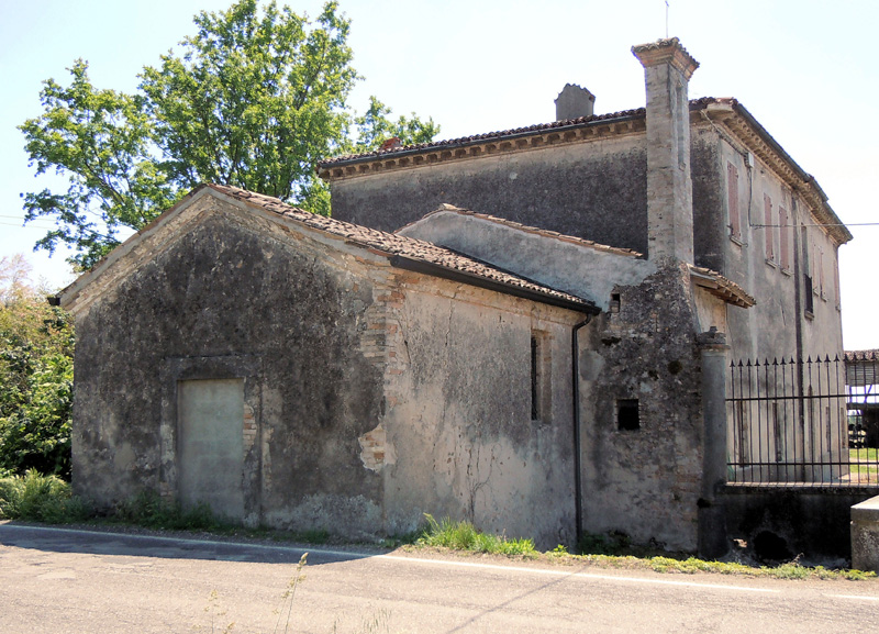 Castel Goffredo, località Gambaredolo, Oratorio di San Carlo.